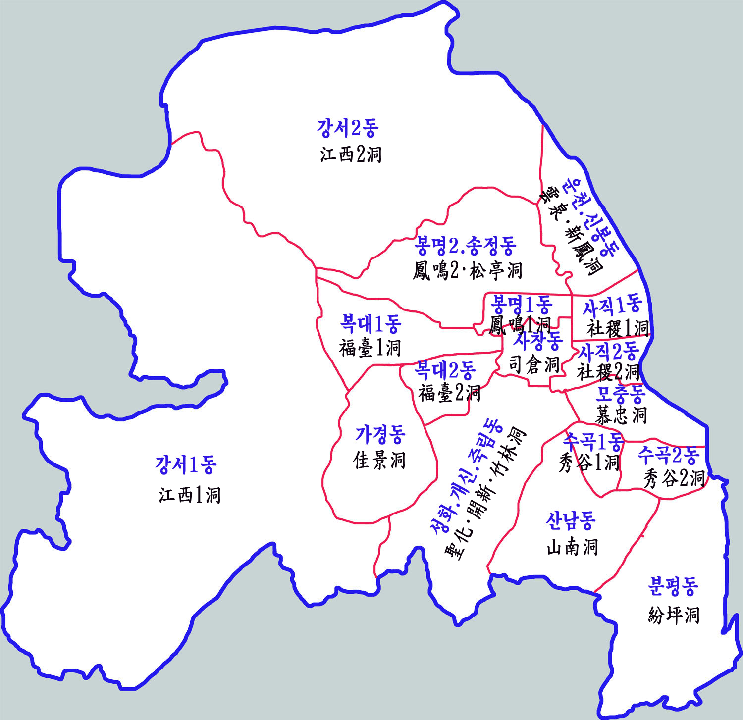 청주시 흥덕구 행정구역도